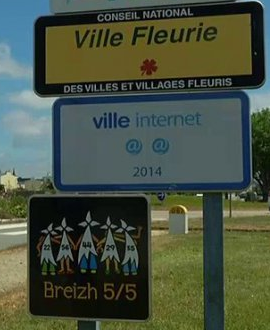 Panell Breizh 5/5 e Gwipavaz.